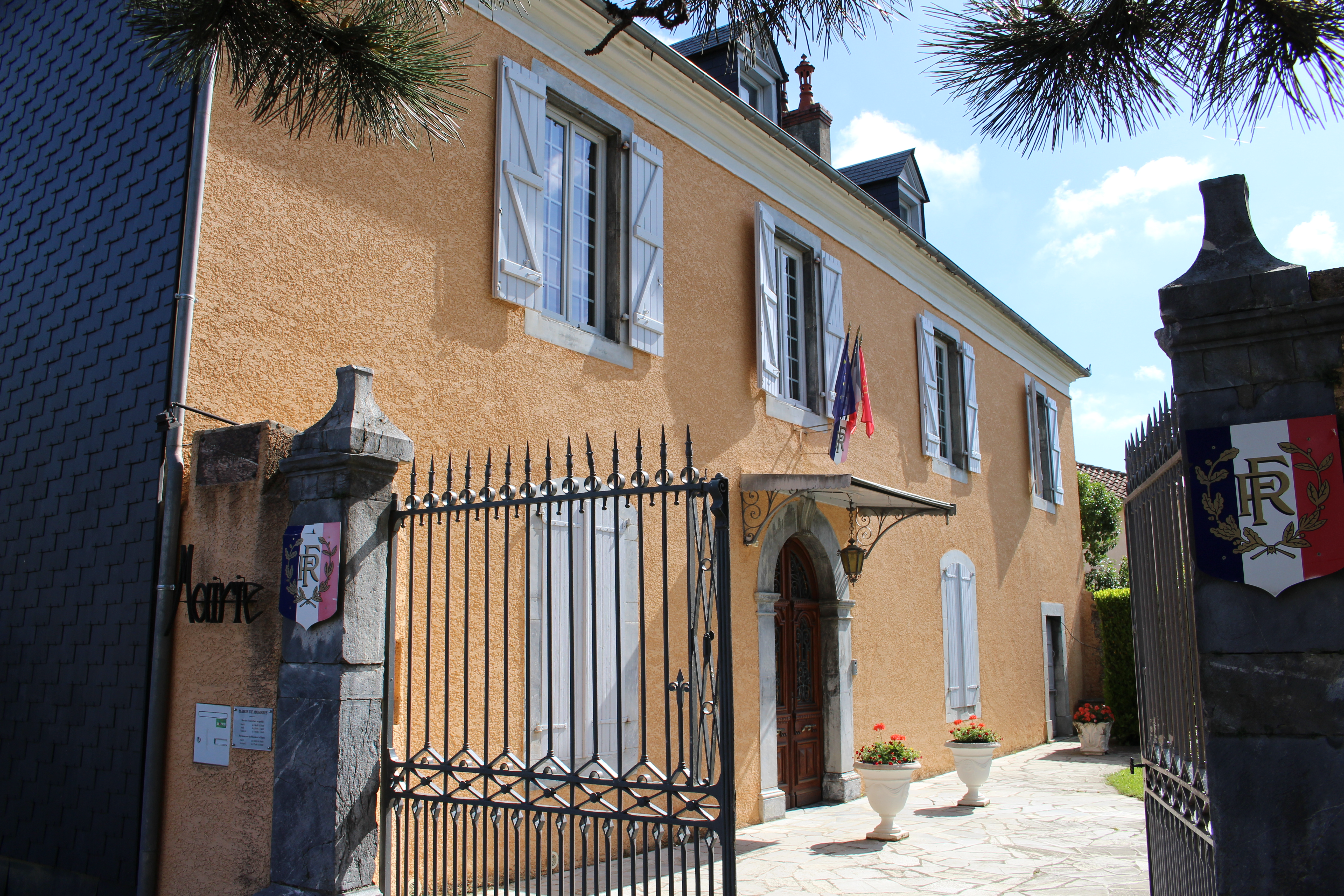 Mairie de Momères (Hautes-Pyrénées)